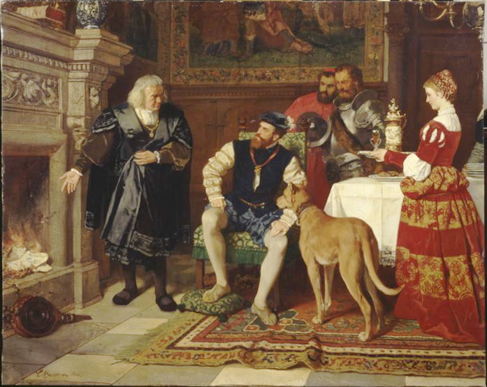 Jakob Fugger brûlant les créances de Charles V